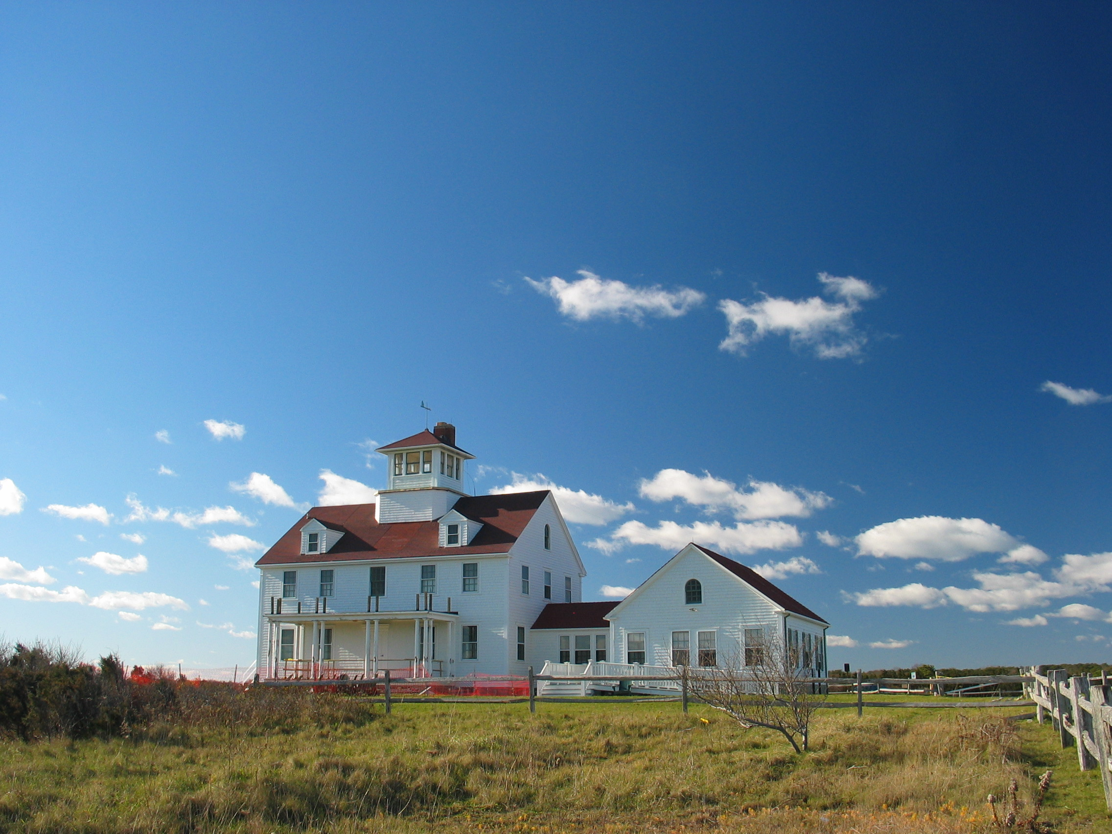 Cape Cod